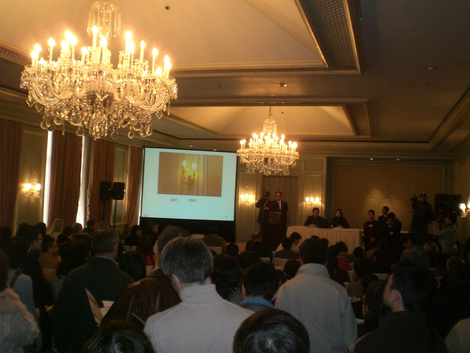 麗嘉酒店拍賣會 Ritz-Calton Hong Kong Hotel, Central Hong Kong